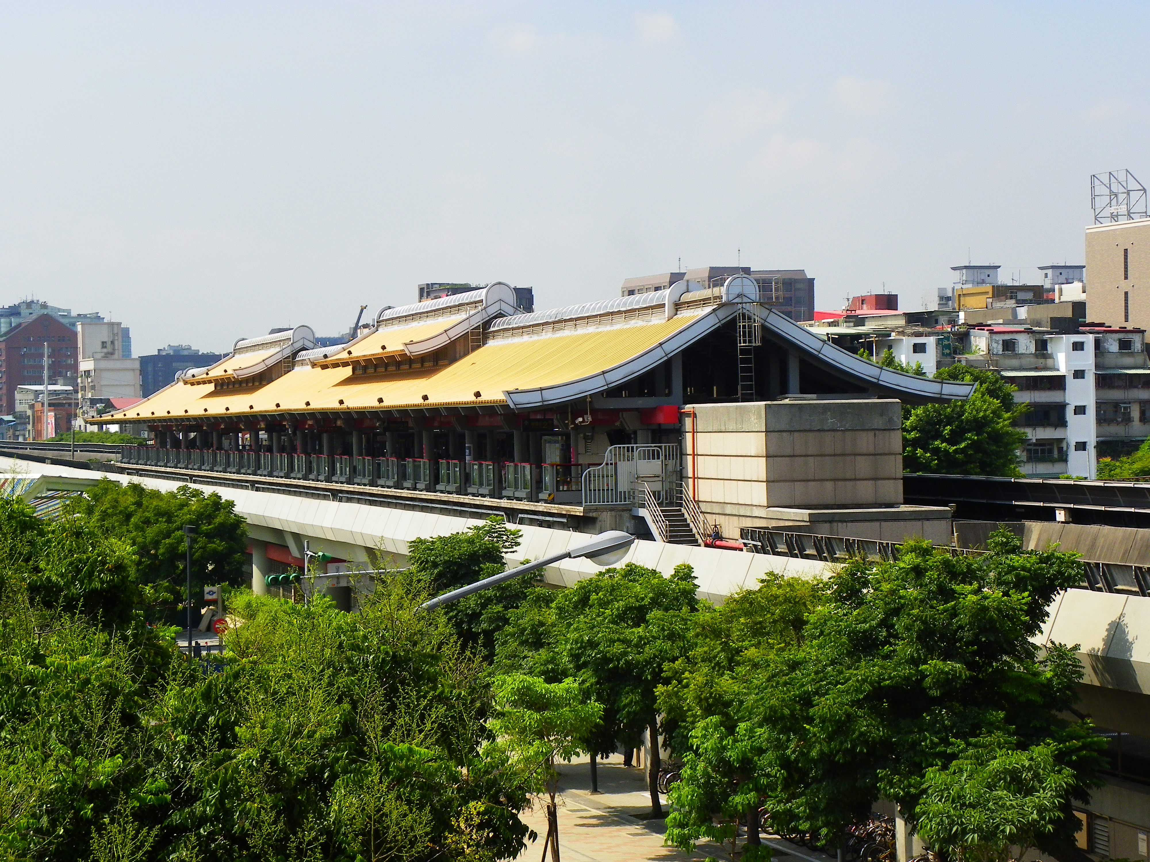 中文（台灣）: 臺北捷運淡水線圓山站，攝於臨濟護國禪寺廂房三樓廊下。